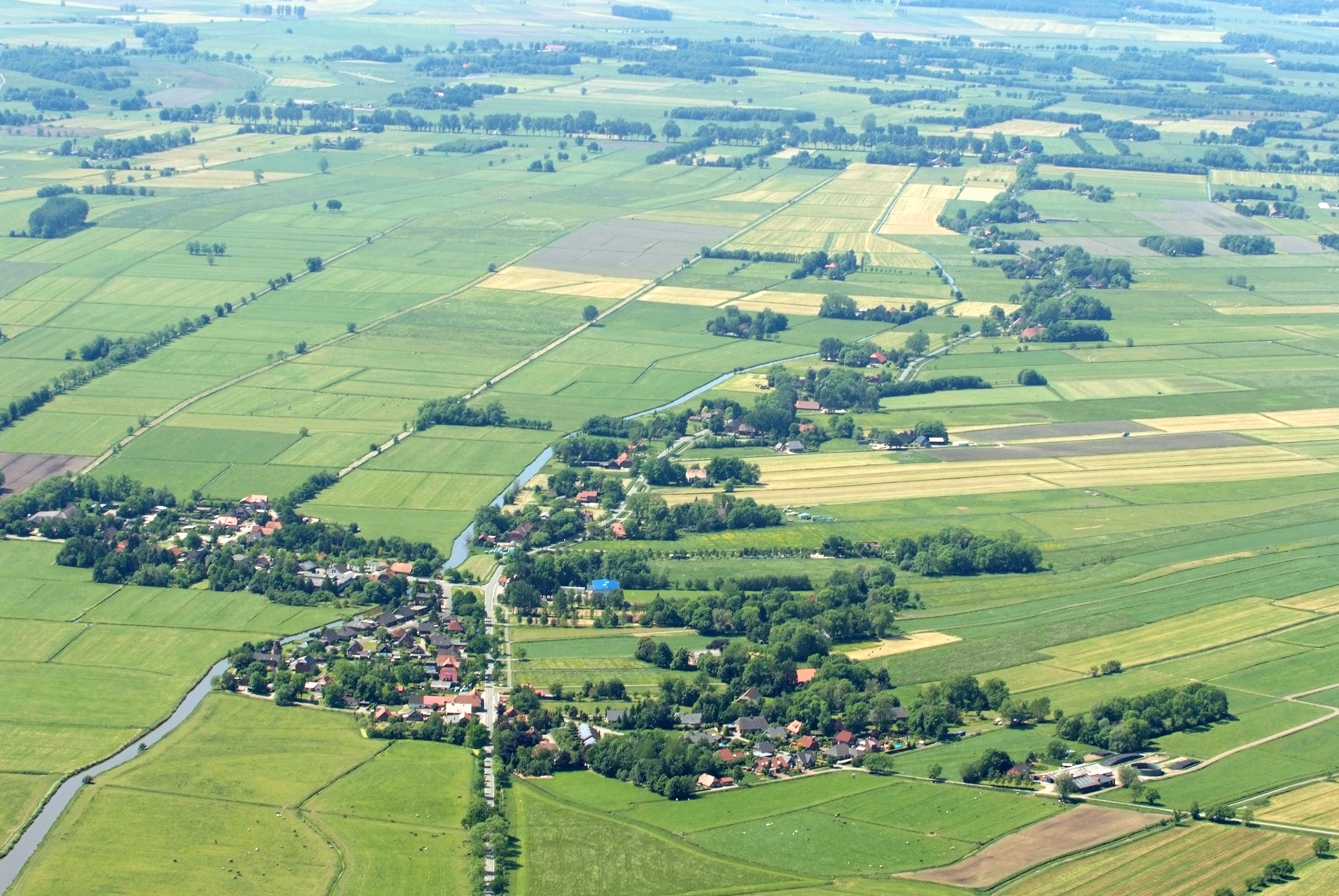 Neustadt in der Gemeinde Jade Fotoflug vom Flugplatz Nordholz-Spieka über Cuxhaven und Wilhelmshaven